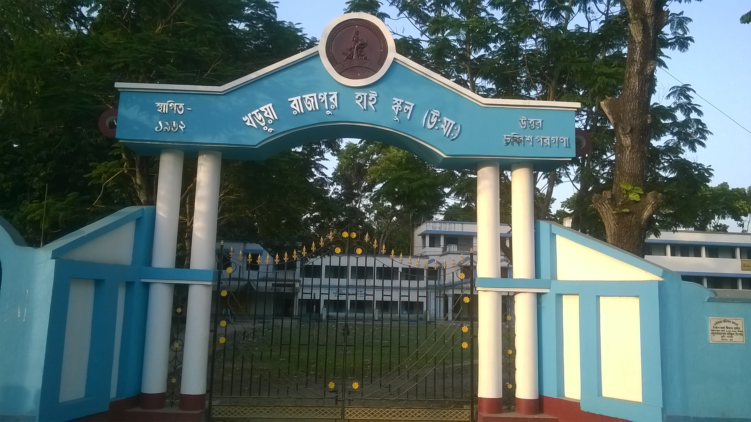 খডুয়া রাজাপুর উচ্চবিদ্যালয়ের প্রধান গেট Kharaua rajapur high school main gate